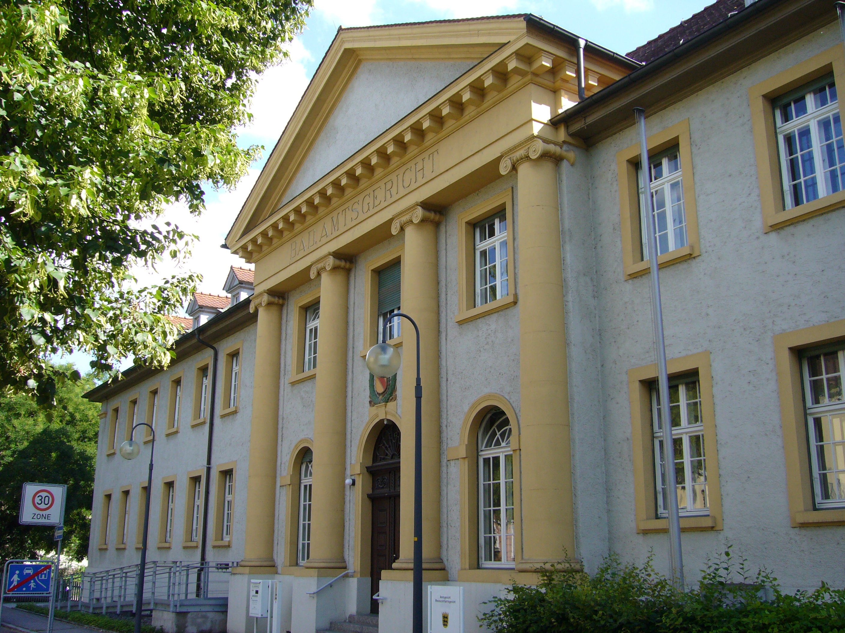 Tribunal d'instance de Kehl